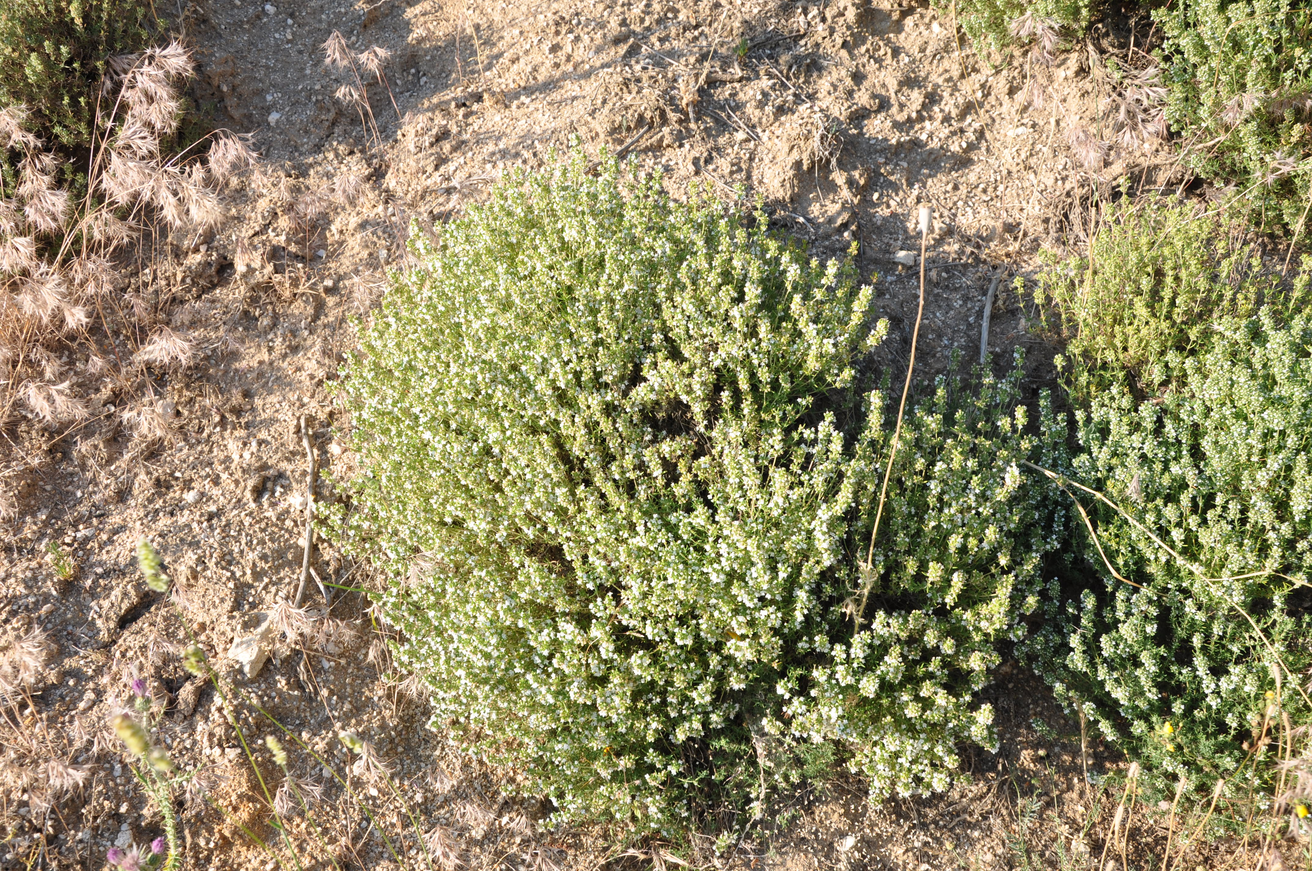 Tomillo salsero en la Sierra de Ávila, España